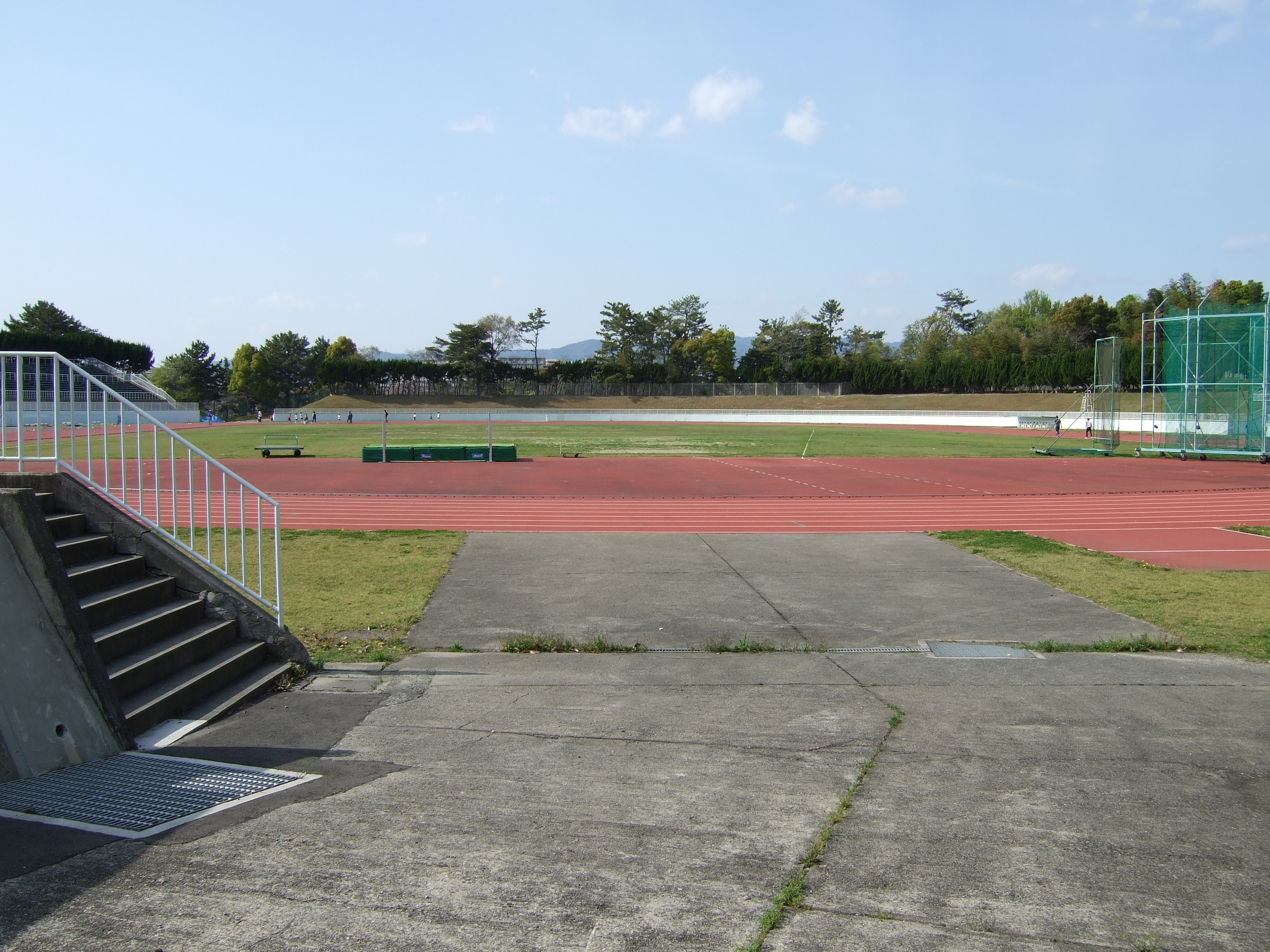 Toyonaka Hattori Ryokuchi